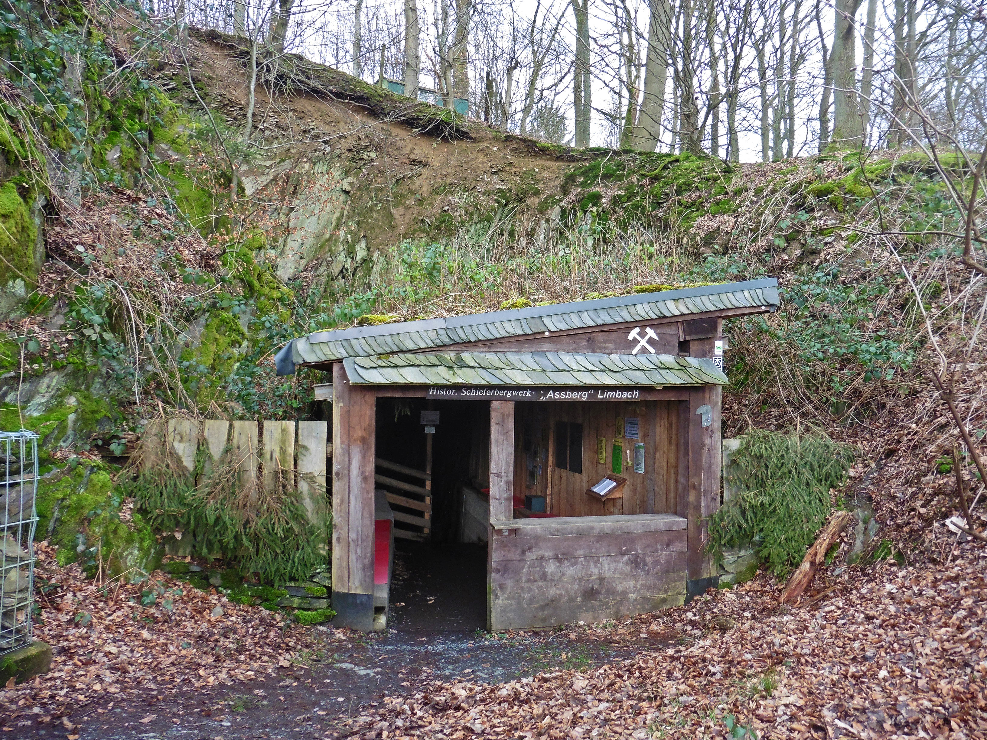 Eingang zum historischen Dachschieferbergwerk "Assberg" im Nistertal südwestlich von Limbach, Westerwaldkreis, Rheinland-Pfalz. Ansicht von Südwesten.